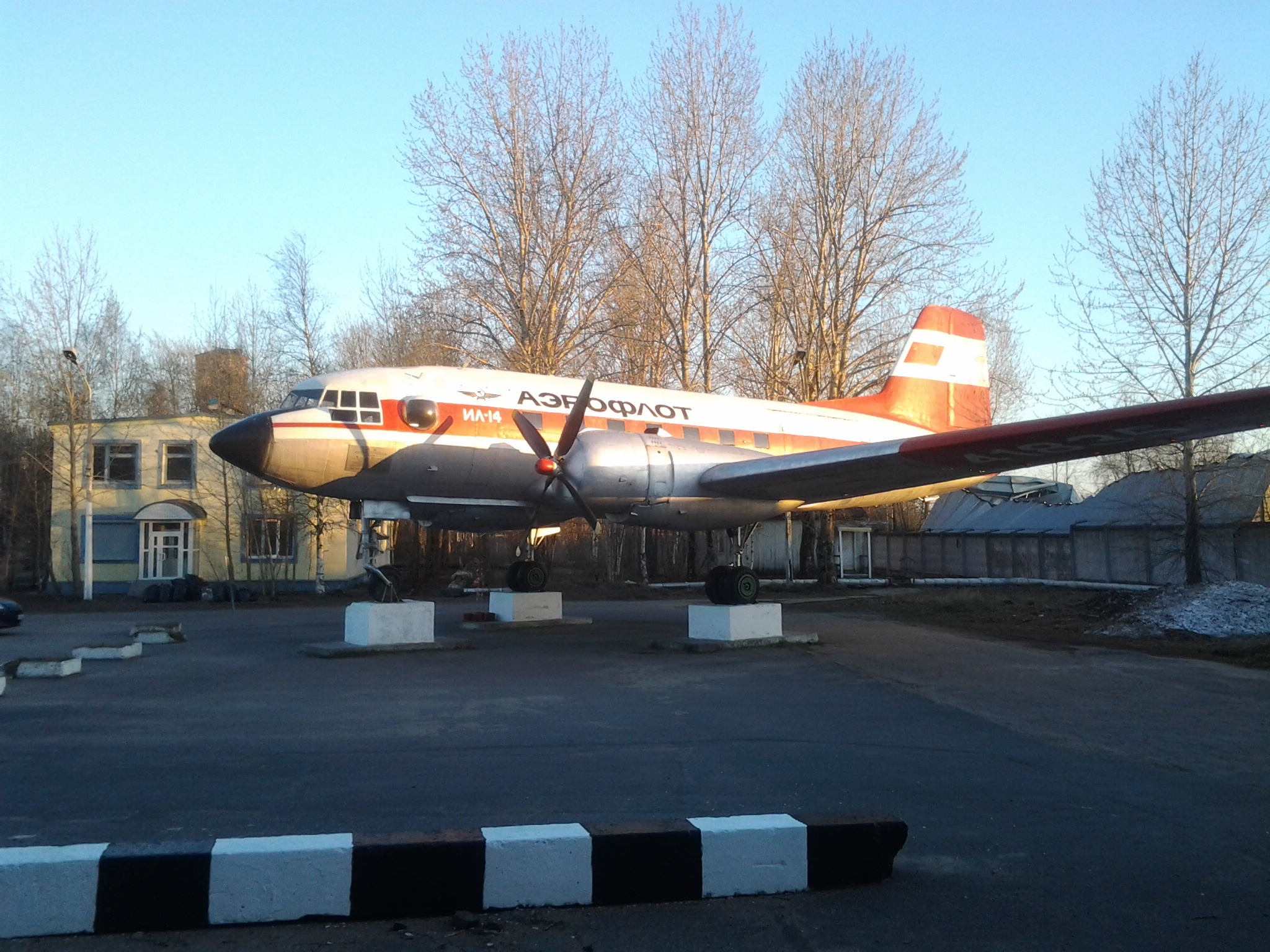 Ил-14 в аэропорту Талаги (Архангельск)